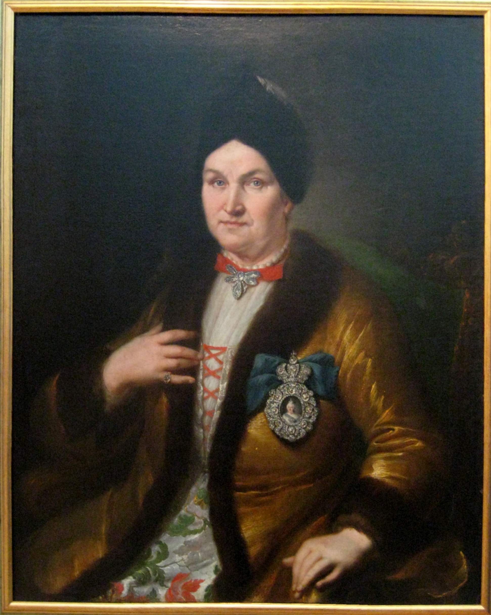 Портрет графини Натальи Демьяновны Разумовской